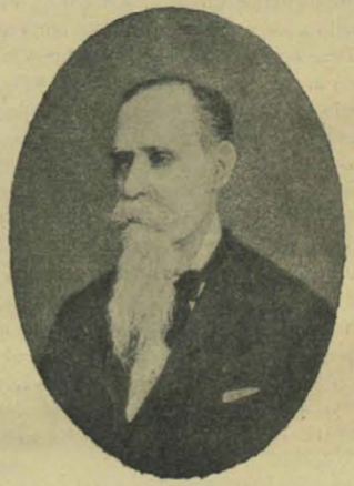 León Galindo de Vera